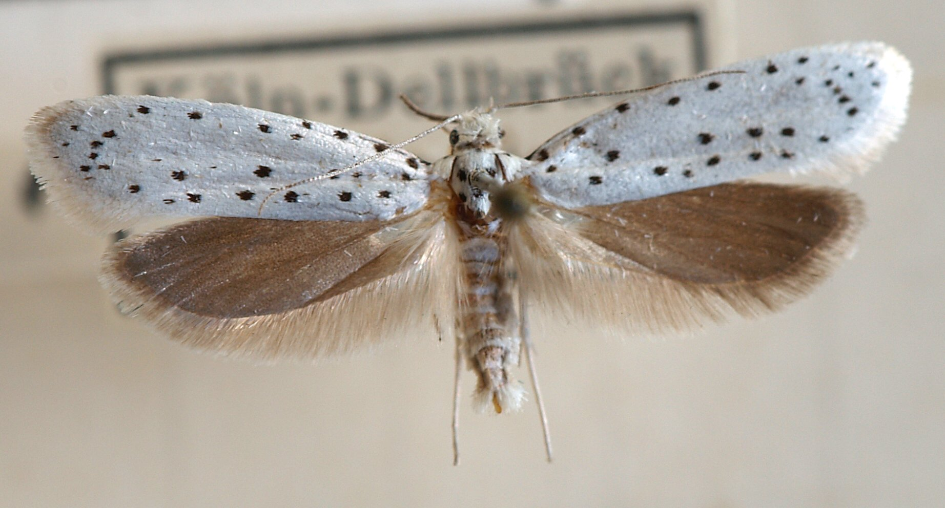 Yponomeuta rorella